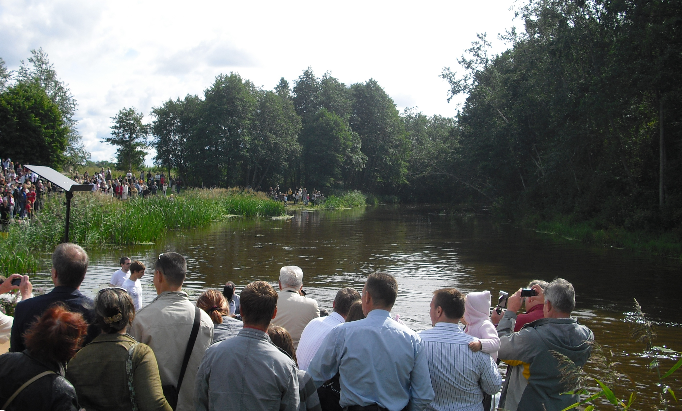 Baptistische Gläubigentaufe in einem Fluss bei Uschawa / Lettland. Dieser Taufgottesdienst, bei dem 90 Täuflinge getauft wurden, fand am 29. August 2010 statt anlässlich des 150jährigen Jubiläums der Baptisten in Lettland. Der Taufort entspricht Stelle, an der im Jahr 1861 die erste Baptistentaufe in Lettland stattfand.